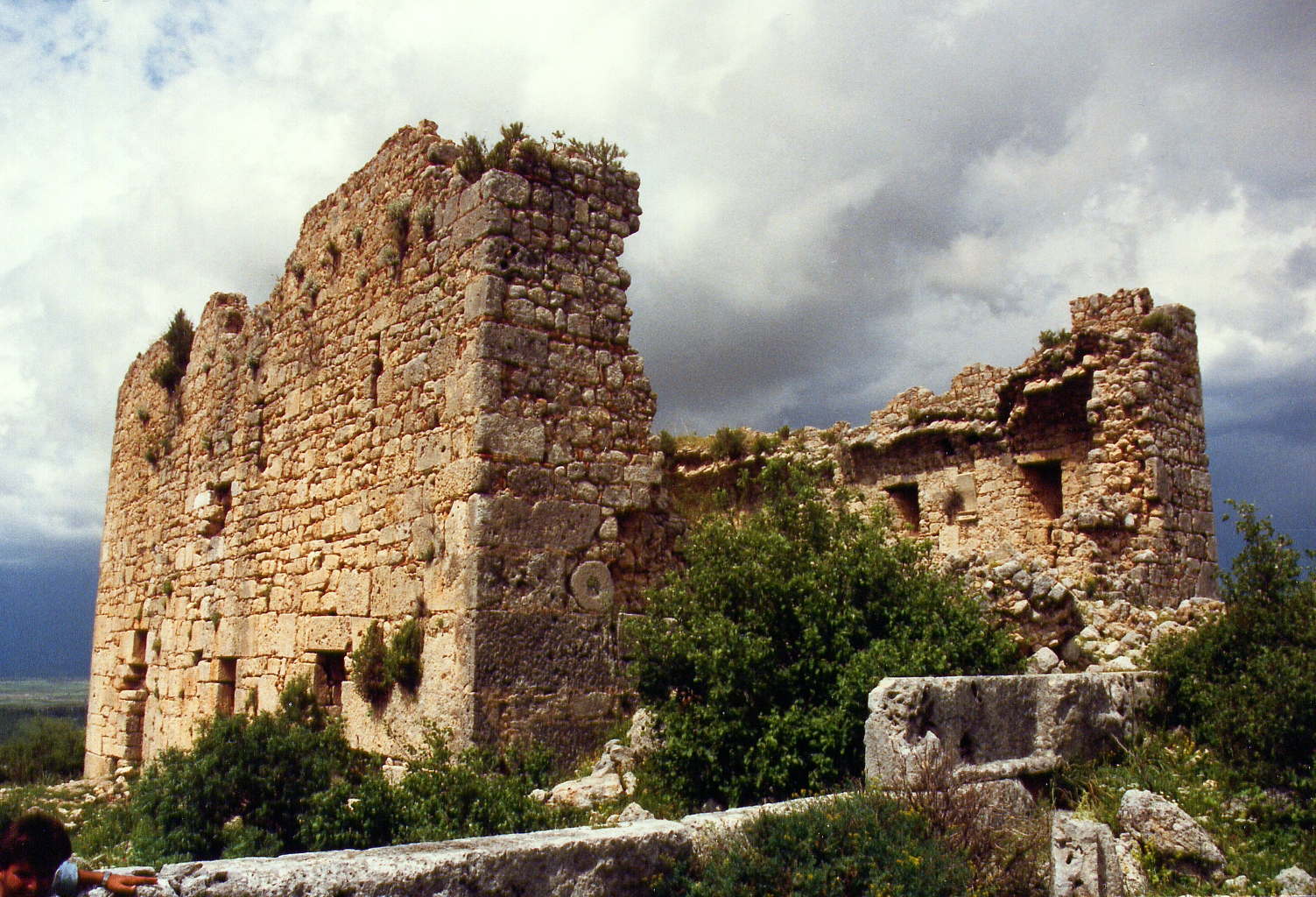 Hellenistisches Gebäude in Sillyon, Südtürkei